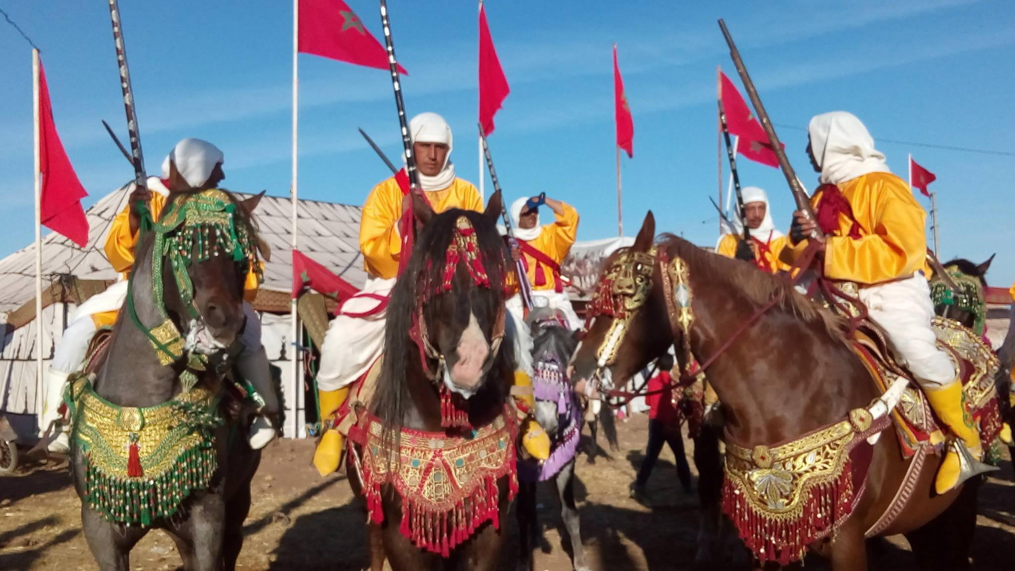 موسم سيدي حجاج